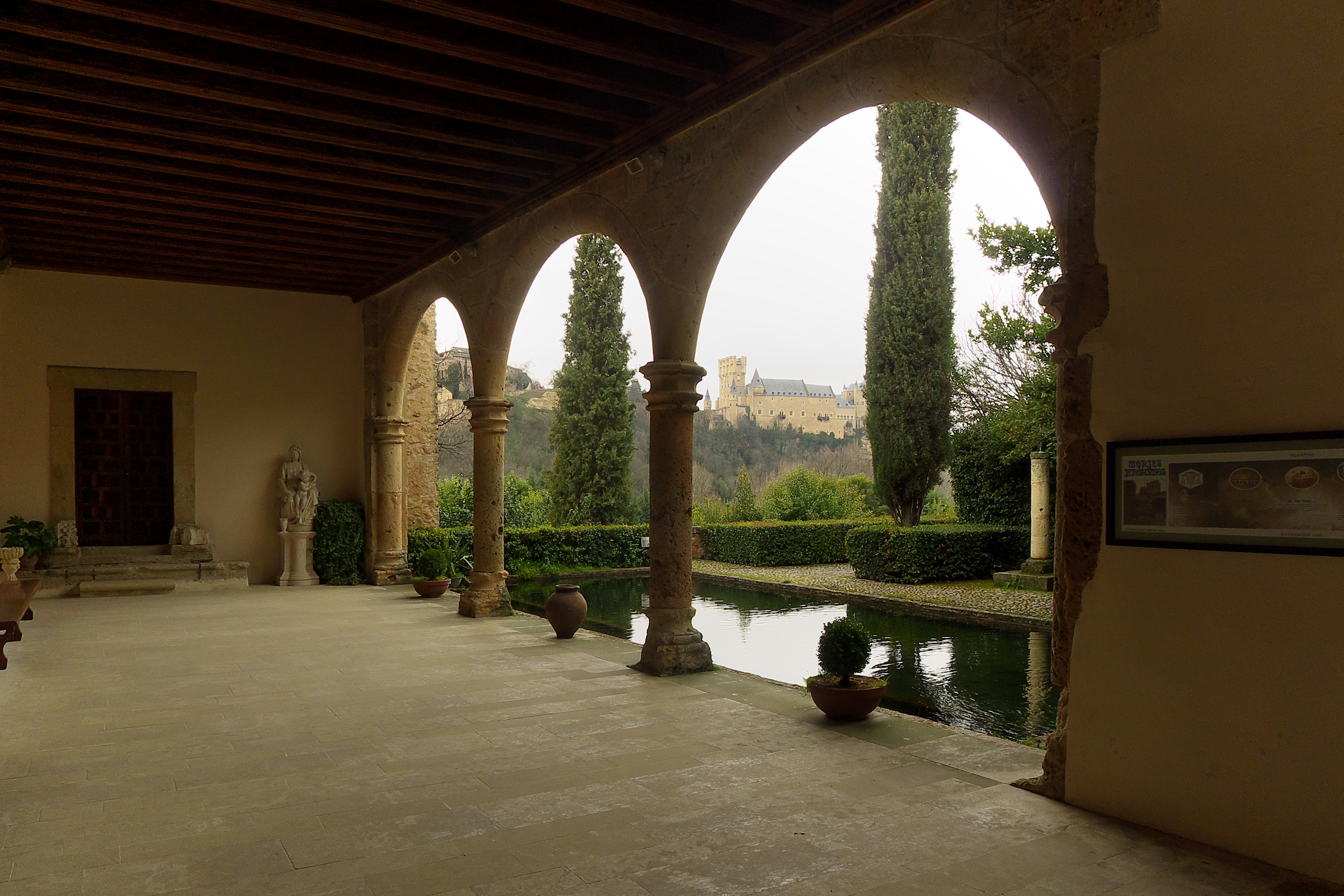 Pórtico de entrada al monasterio jerónimo